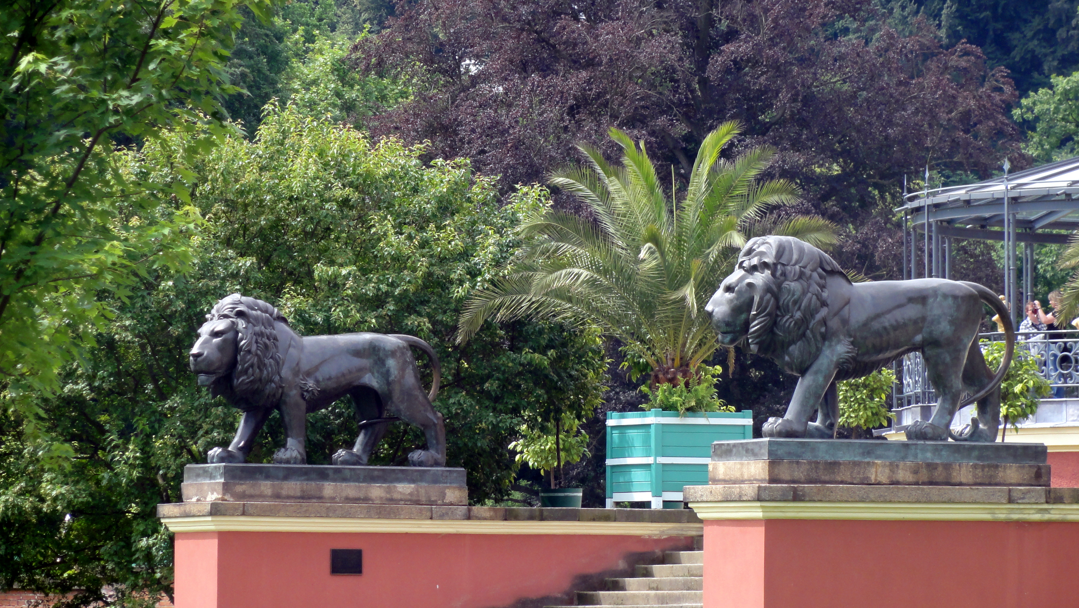 Pomniki lwów w Parku Mużakowskim.